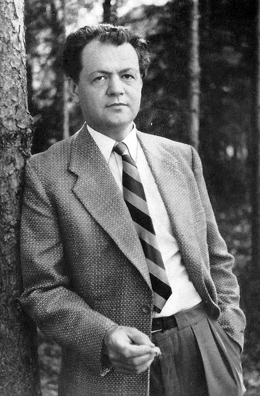 Sven Rosendahl